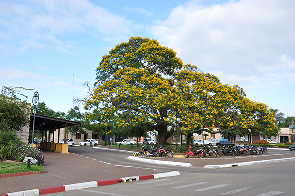 Ibirapita